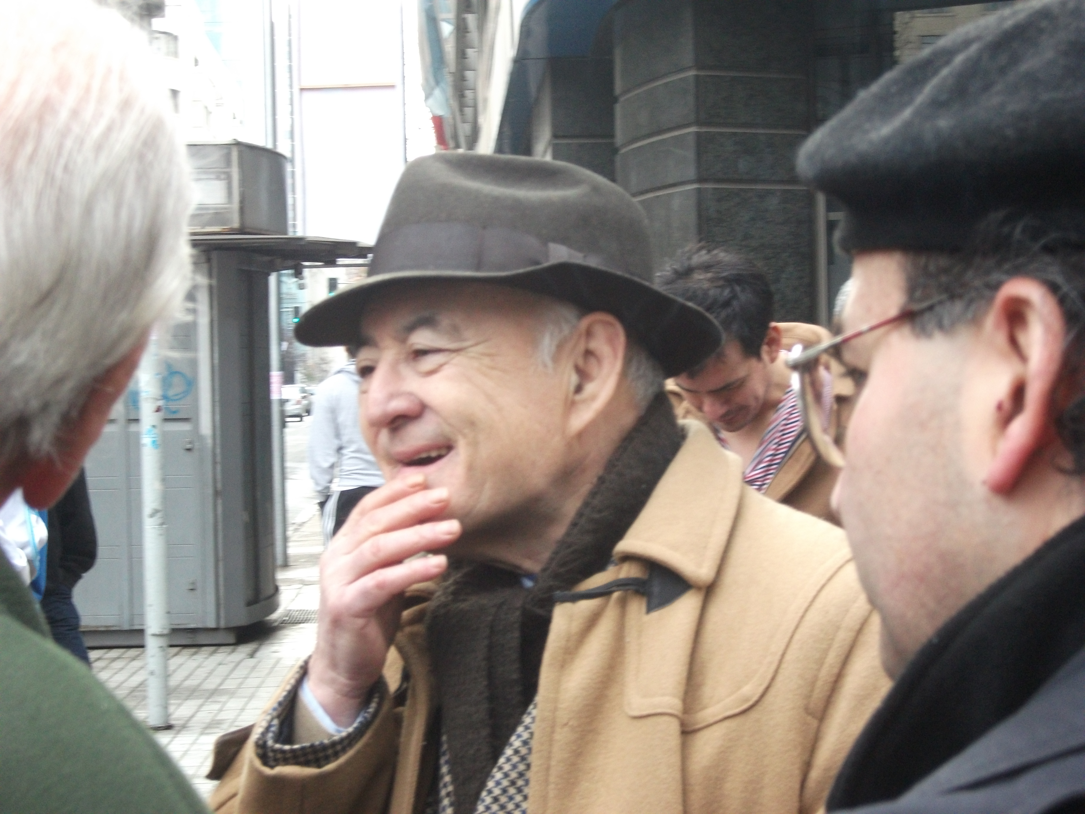 Ernesto Carmona el 29 de Junio 2013 en acto en la ciudad de Santiago de Chile en acto recordatorio del asesinato del Periodista y camarógrafo Leonardo Henrichsen